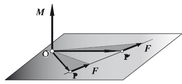 Momento de una fuerza